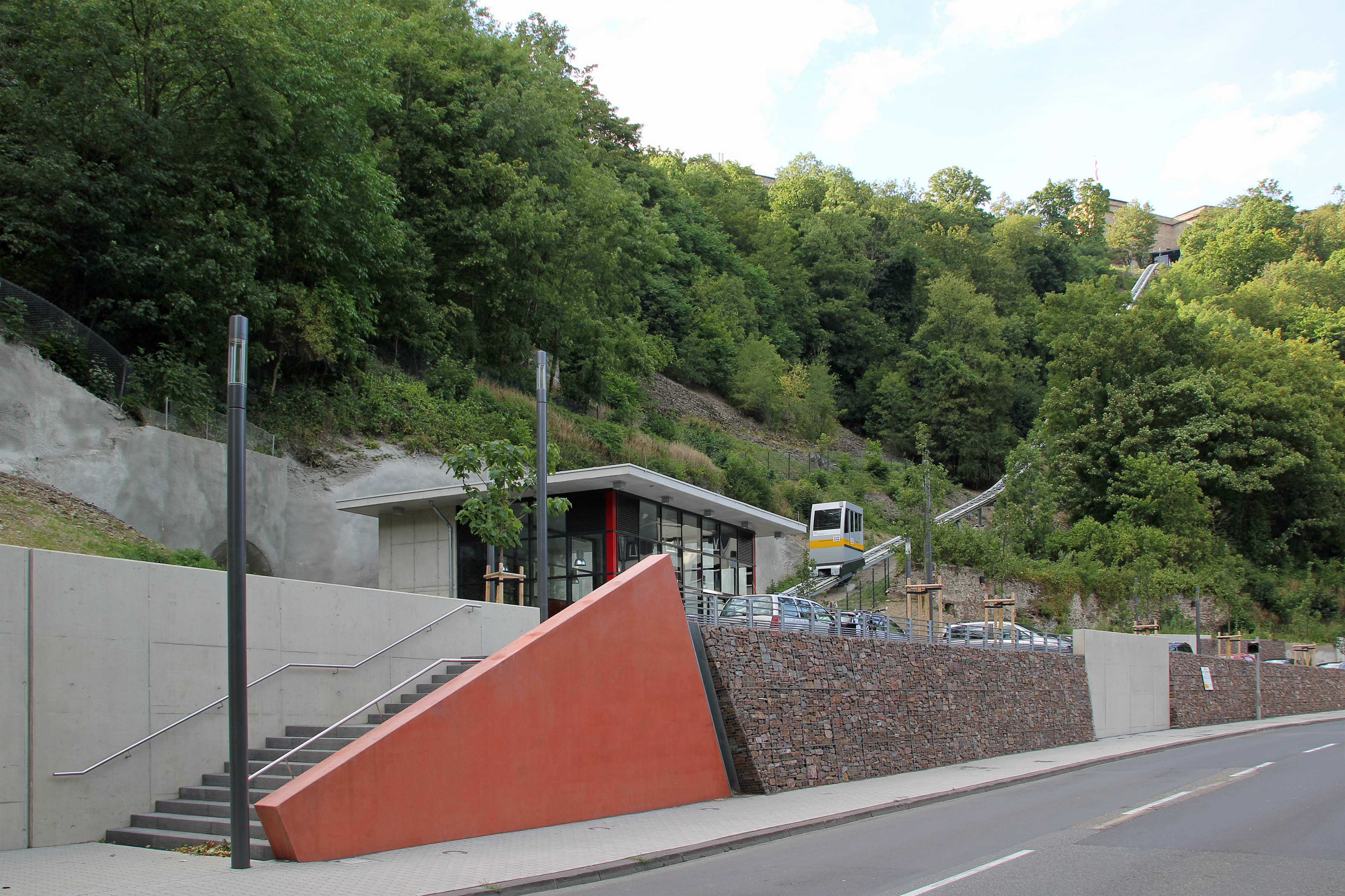 Koblenz im Buga-Jahr 2011 - Der Schrägaufzug Ehrenbreitstein